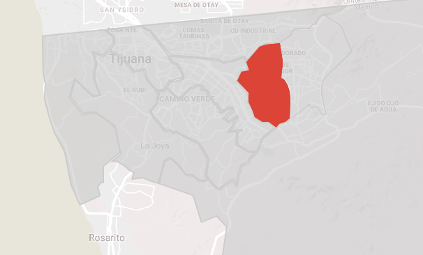 Demarcación territorial del municipio de Tijuana